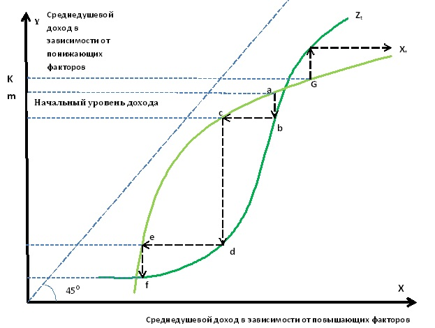 Порочный круг нищеты по Х. Лейбенстайну.